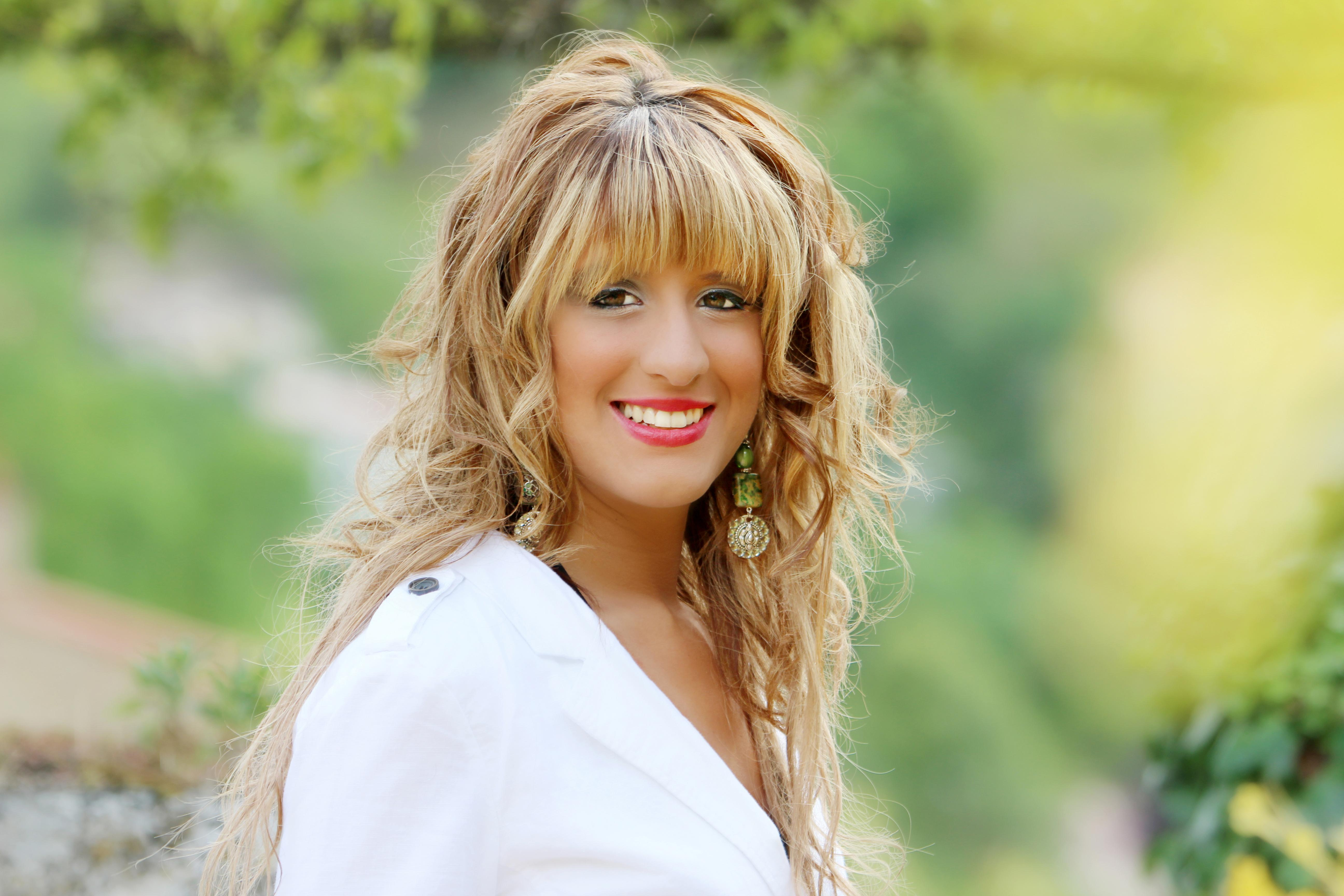 photo